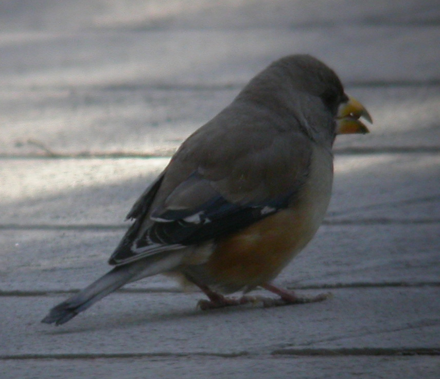 黑尾蜡嘴雀雌鸟，摄于天坛，自己拍的，本图片不允许百度百科使用